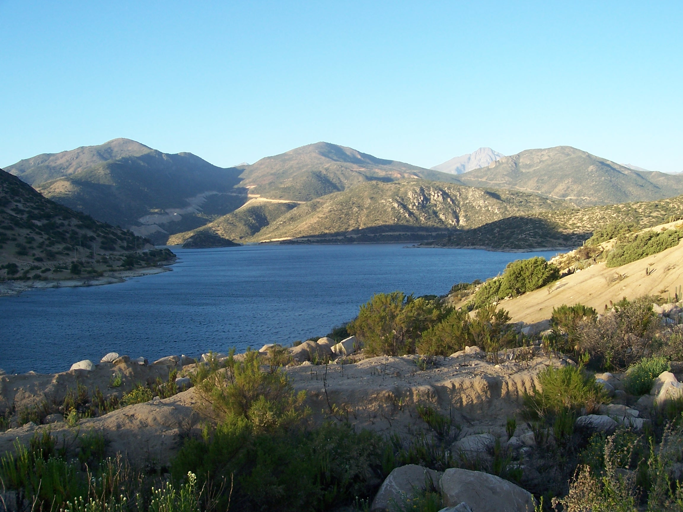 Embalse Corrales, Salamanca, Chile